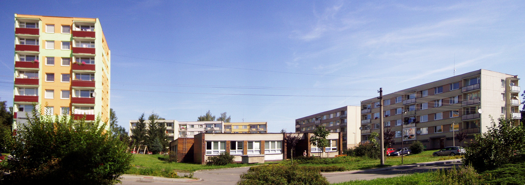 Sídliště, uprostřed zdravotní středisko